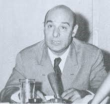 محمد درخشش